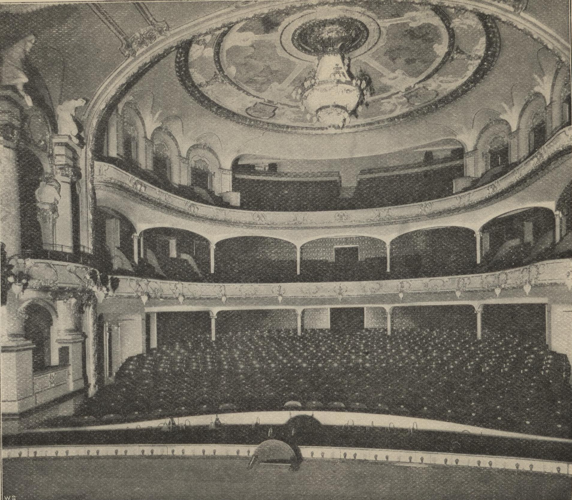 Illustrasjon hentet fra boken "Nationaltheatret i Kristiania" av ukjent forfatter og utgitt av (Kristiania, 1899)